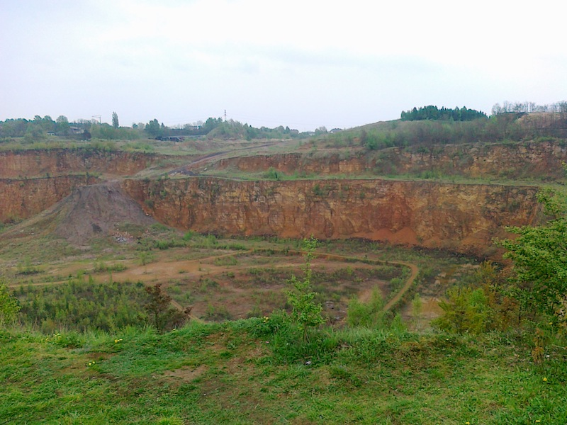 Kamieniołom Bobrowniki, widok od północnego wschodu.